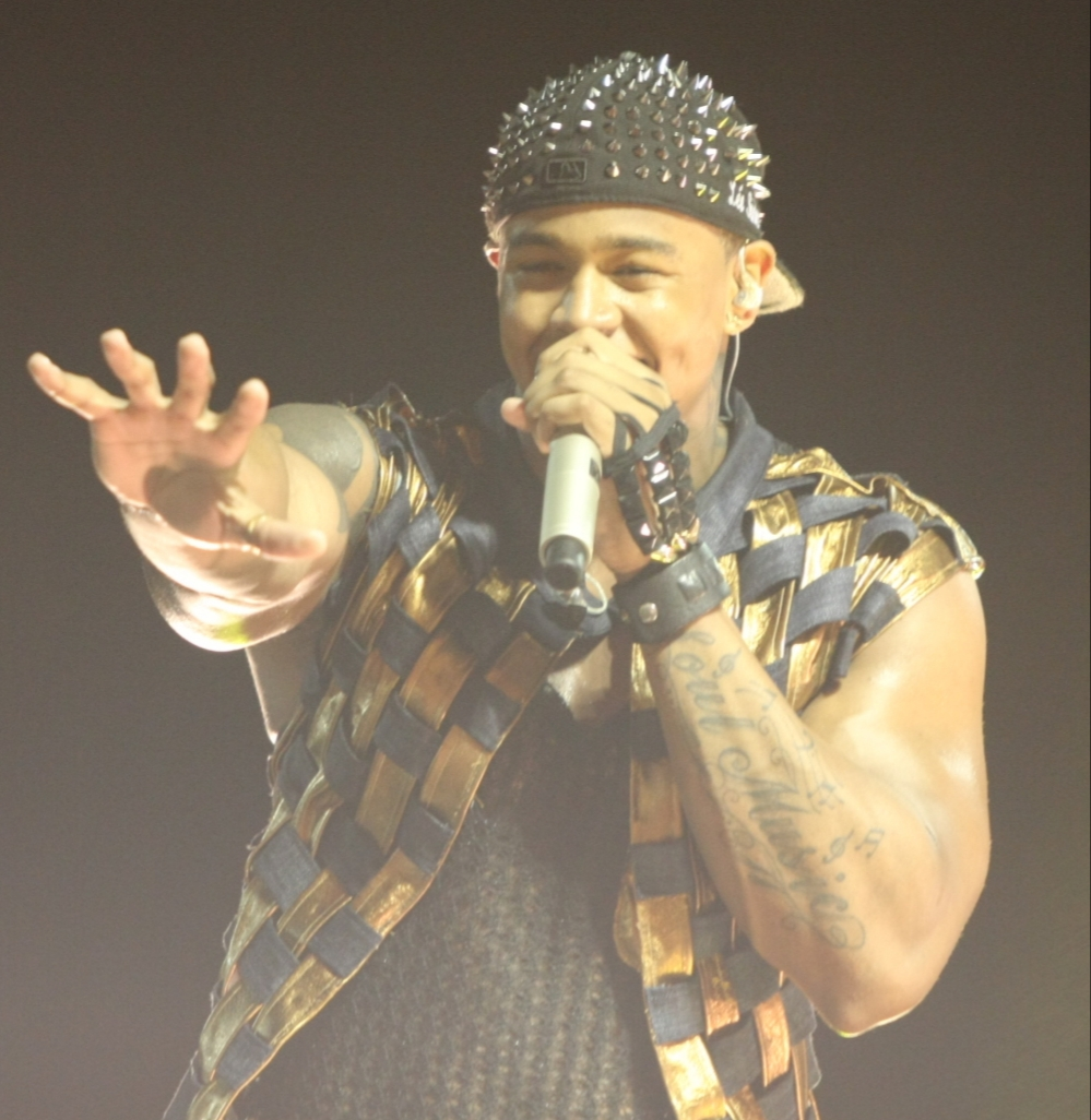 Leo Santana cantando no Carnaval em 2013.